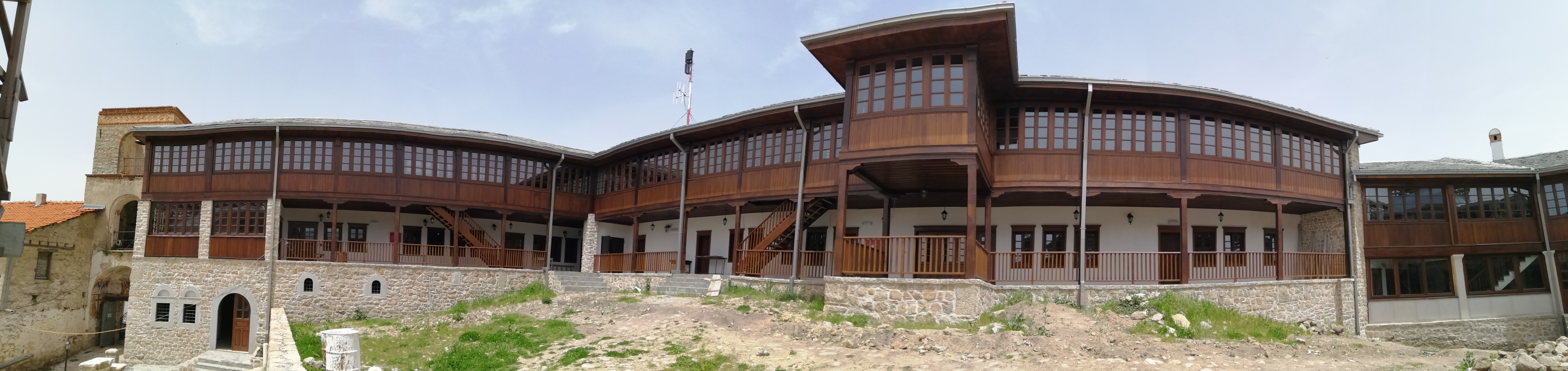 Конаците во манастирот Трескавец